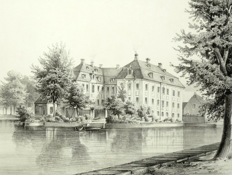 Schloss Canitz bei Riesa aus: Album der Schlösser und Rittergüter im Königreiche Sachsen .... Section II: Meissnischer Kreis (Leipzig: Expedition des Albums Sächsischer Rittergüter und Schlösser 1856). - Unterhalb betitelt. Druck bei L. Blau & Co. in Leipzig.